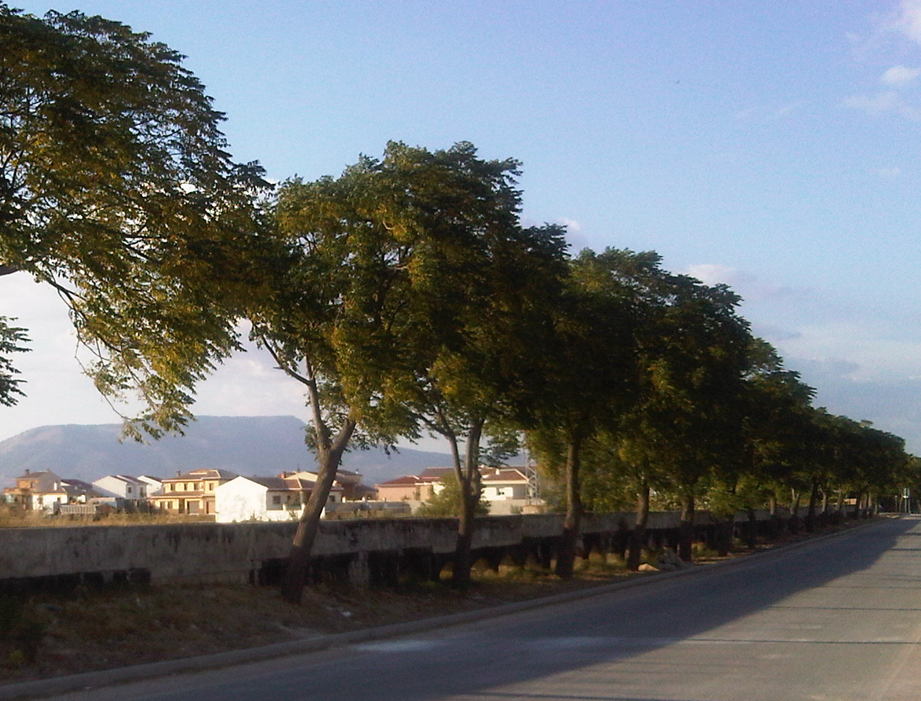 Paseo de la Constitución, en la localidad de Peñuelas (municipio de Láchar, Granada, España). Esta travesía de la Carretera GR-3400 por el pueblo está flanqueada en casi todo su recorrido con la acequia que se observa en imagen. En segundo plano, la Urbanización La Florida. Al fondo, la Sierra de Parapanda.